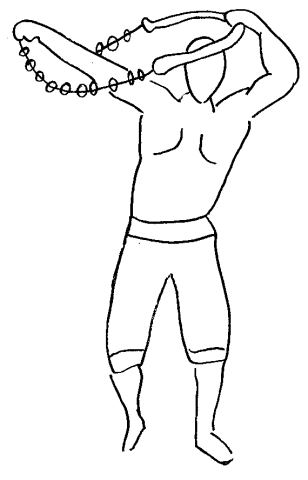 Kabadeh gereftan moves in Varzesh-e Pahlavani